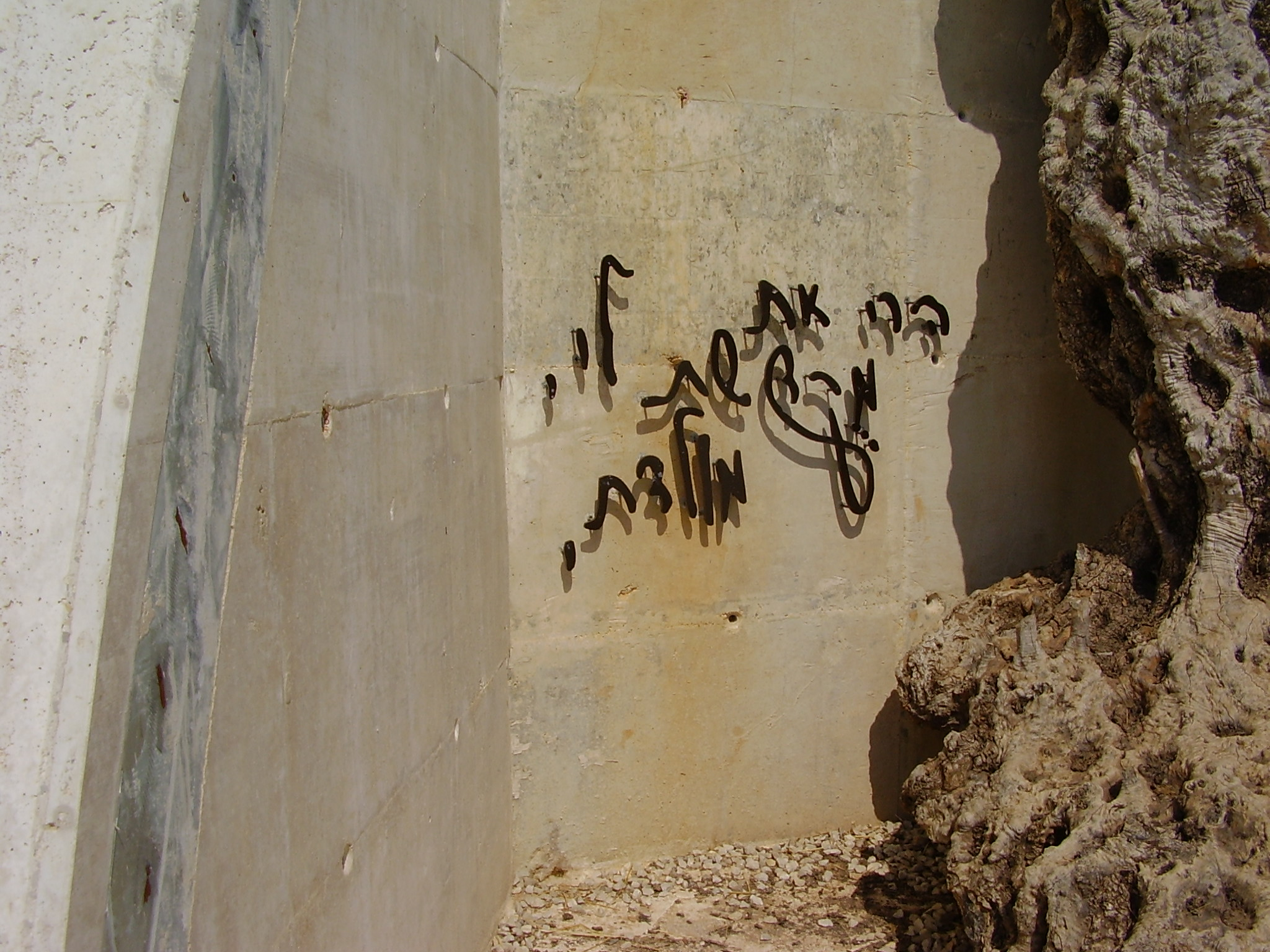 כתב ידו של אברהם שטרן באנדרטת לח"י